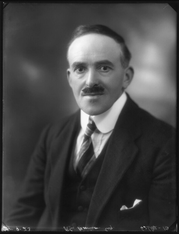 Lord Morrisson